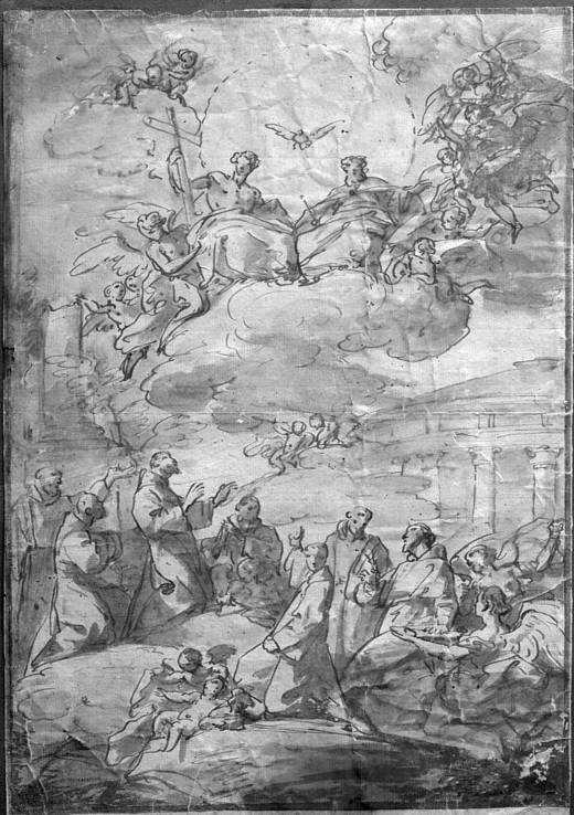 La Trinidad y santos franciscanos, dibujo a la aguada y pluma sobre papel, 396 mm x 263 mm; Madrid, Museo del Prado.